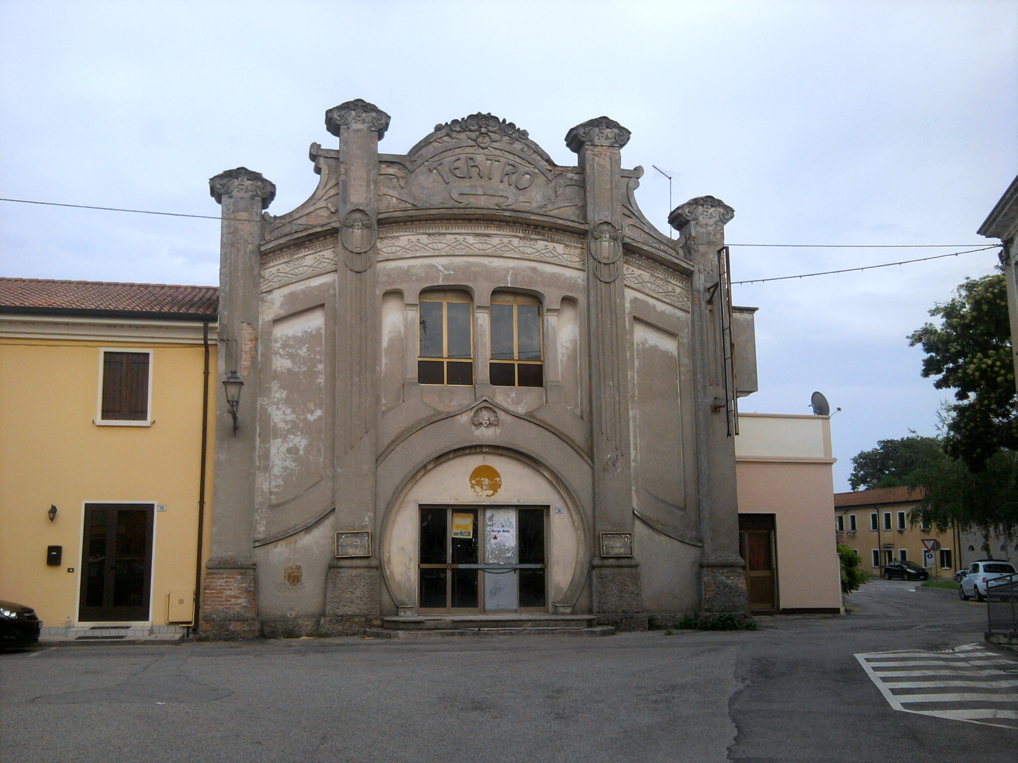 Loreo: il Teatro Zago in stile Liberty.